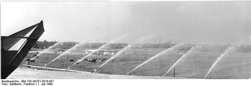 Lößnig, Beregnungsanlage im Einsatz Zentralbild Gahlbeck 1-7-69 Leipzig-Markkleeberg: "agra 69" - Während der Woche der Bodenfruchtbarkeit auf der "agra 69" (vom 30.6.-5.7.69) ist auf dem Gelände des Ausstellungsteils "Bodenfruchtbarkeit" in Lößnig diese Beregnungsanlage zu sehen. Während dieser Woche finden zahlreiche Veranstaltungen und Vorführungen an den Konsultationspunkten Bewässerung und Melioration statt. (zweiteiliges Panorama)